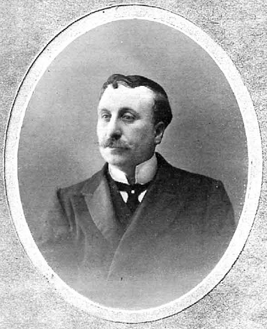 Retrato de Eduardo Vincenti, obra de Manuel Compañy, recogido en la revista española La Ilustración Española y Americana.